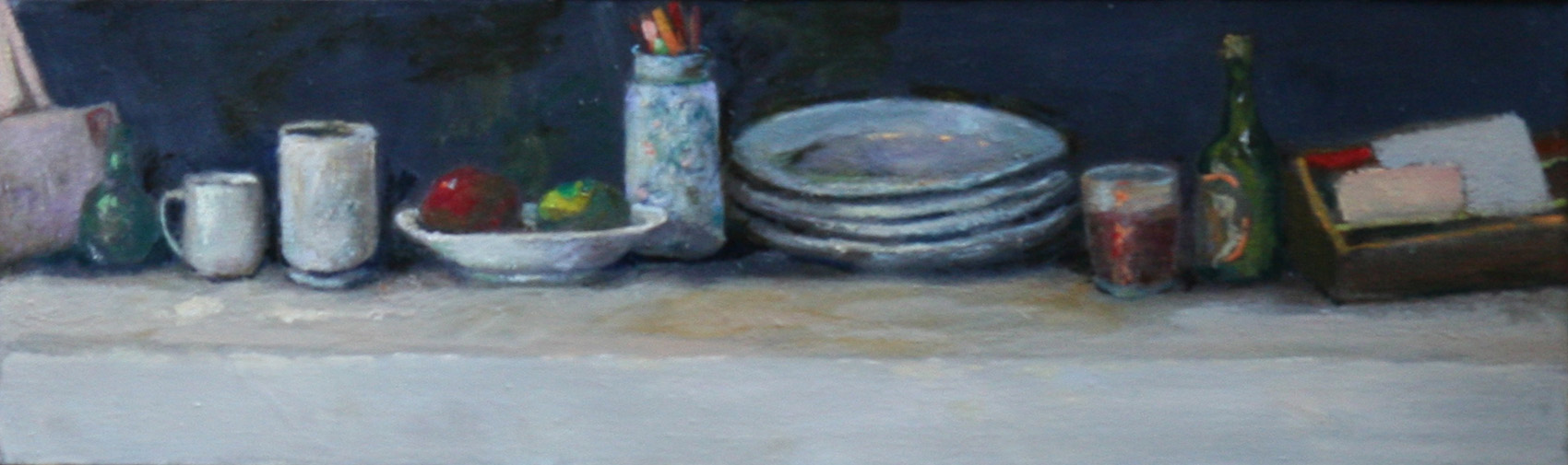 Nature morte